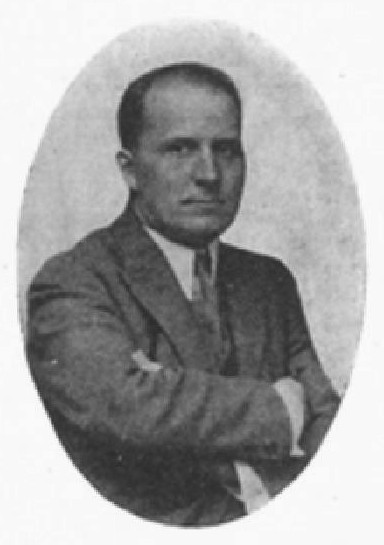 Rudolf Koss (1884-1929), český historik a archivář